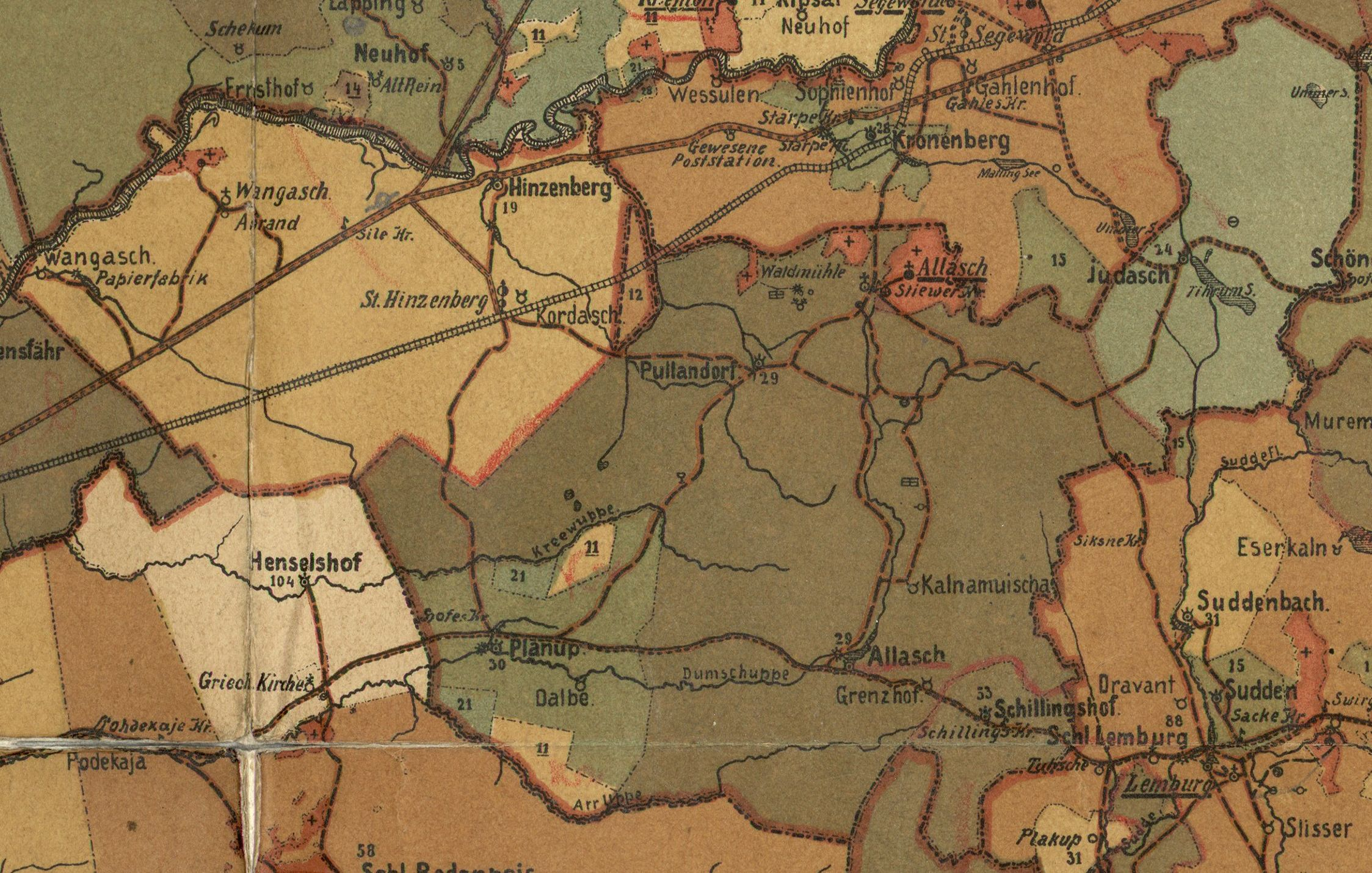 Allaži kihelkonna mõisad 1905. aastal